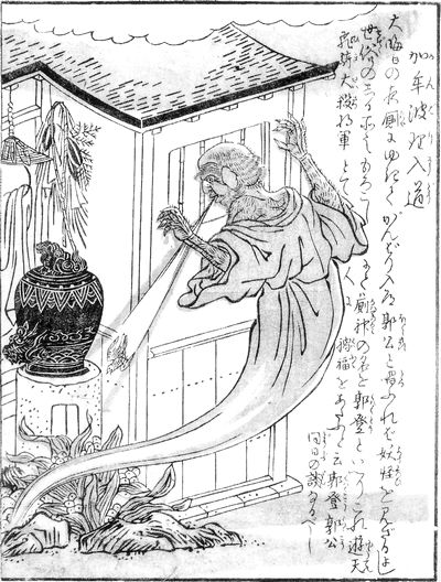 Kanbari-nyūdō (加牟波理入道, a bathroom spirit) from the Konjaku Gazu Zoku Hyakki (今昔画図続百鬼)